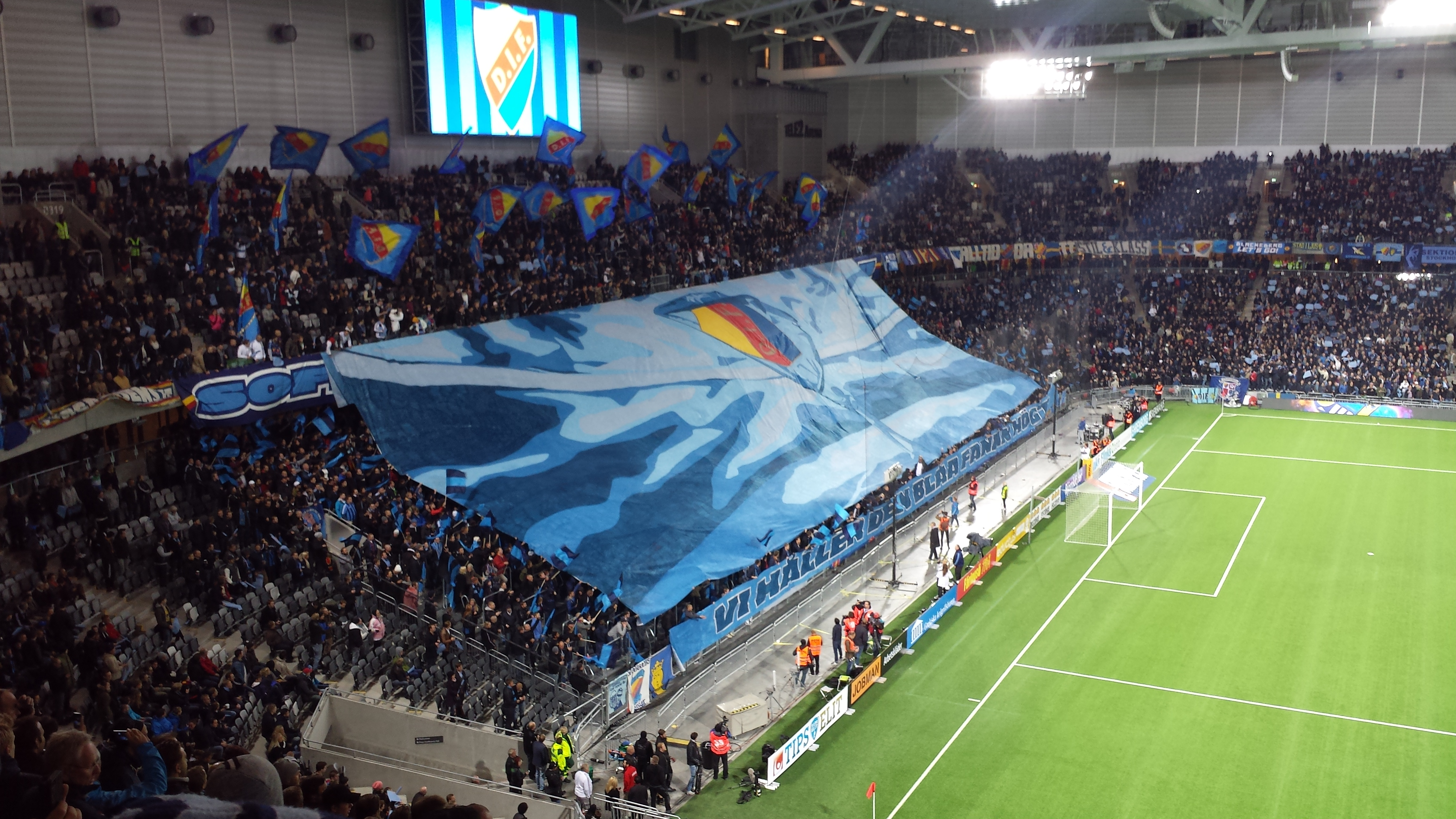 Djurgårdens IF - AIK, Tele 2 Arena, 26 september 2013